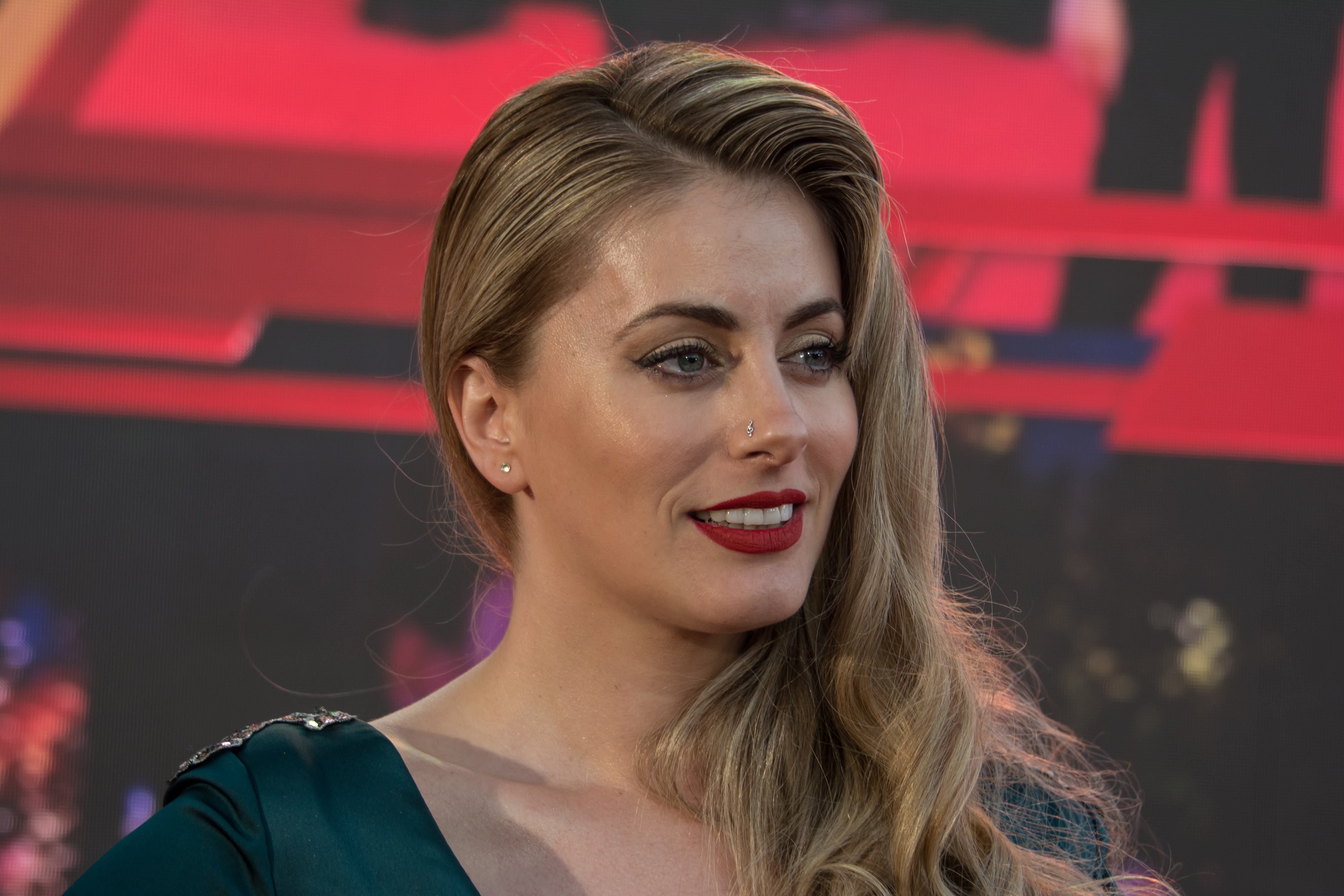 Catalina Palacios, Copihue de Oro 2018, Sun Monticello, Mostazal, Región de O'Higgins, Chile